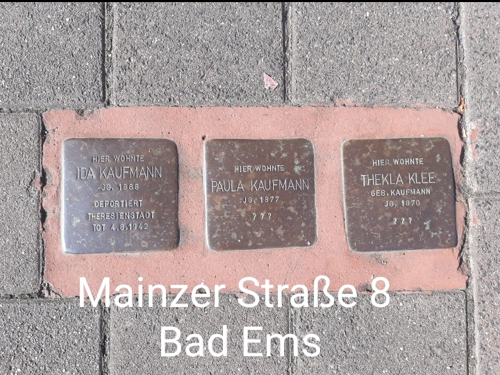 StolpersteinBadEms